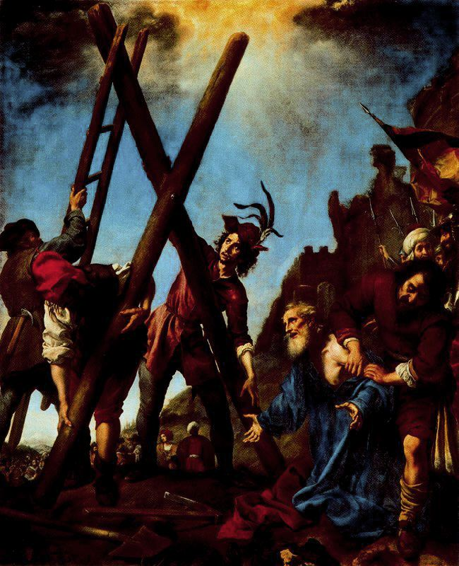 Crocifissione di S. AndreaThe Crucifixion of Saint Andrewtitle QS:P1476,it:"Crocifissione di S. Andrea" label QS:Lit,"Crocifissione di S. Andrea" label QS:Len,"The Crucifixion of Saint Andrew"